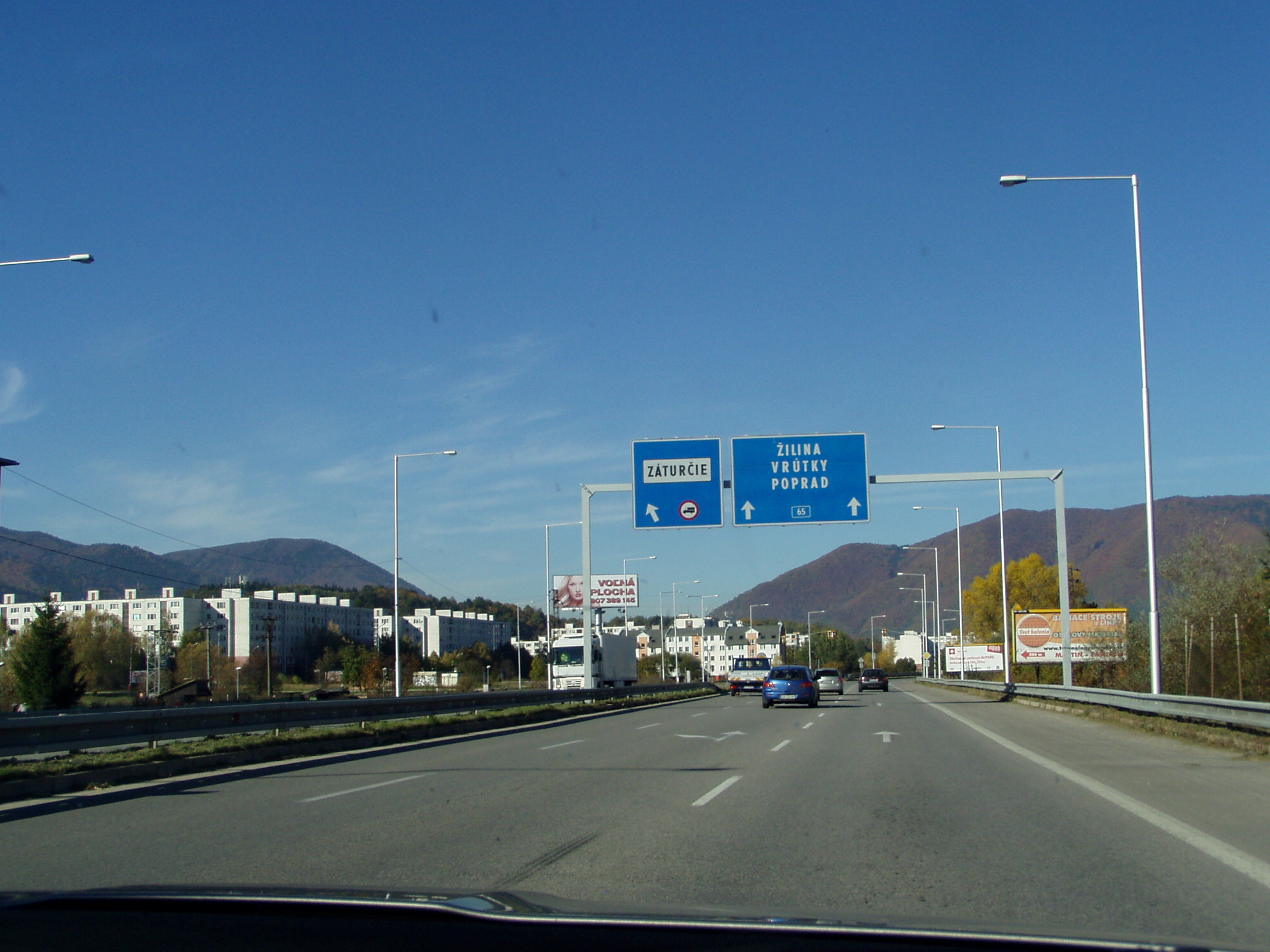 Smer k Žiline od Príboviec